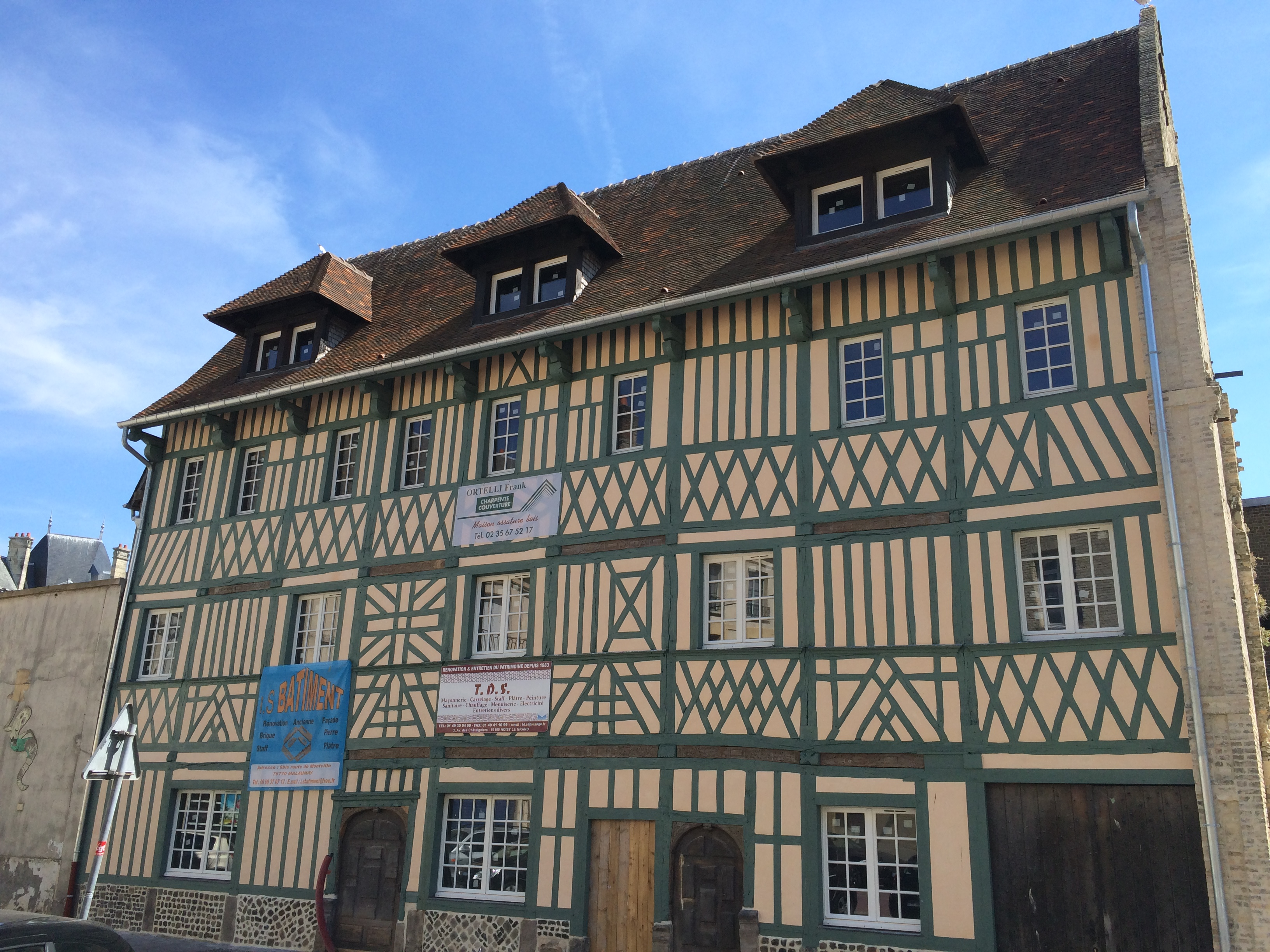 Maison Miffant à Dieppe, Seine Maritime